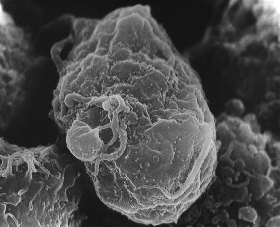 Выделение вируса иммунодефицита человека с поверхности заражённого лимфоцита